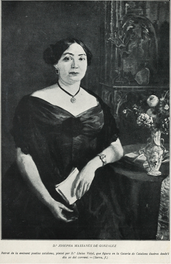 Josepha Massanés de Gonzalez. Publicat a la revista Feminal al juny de 1915